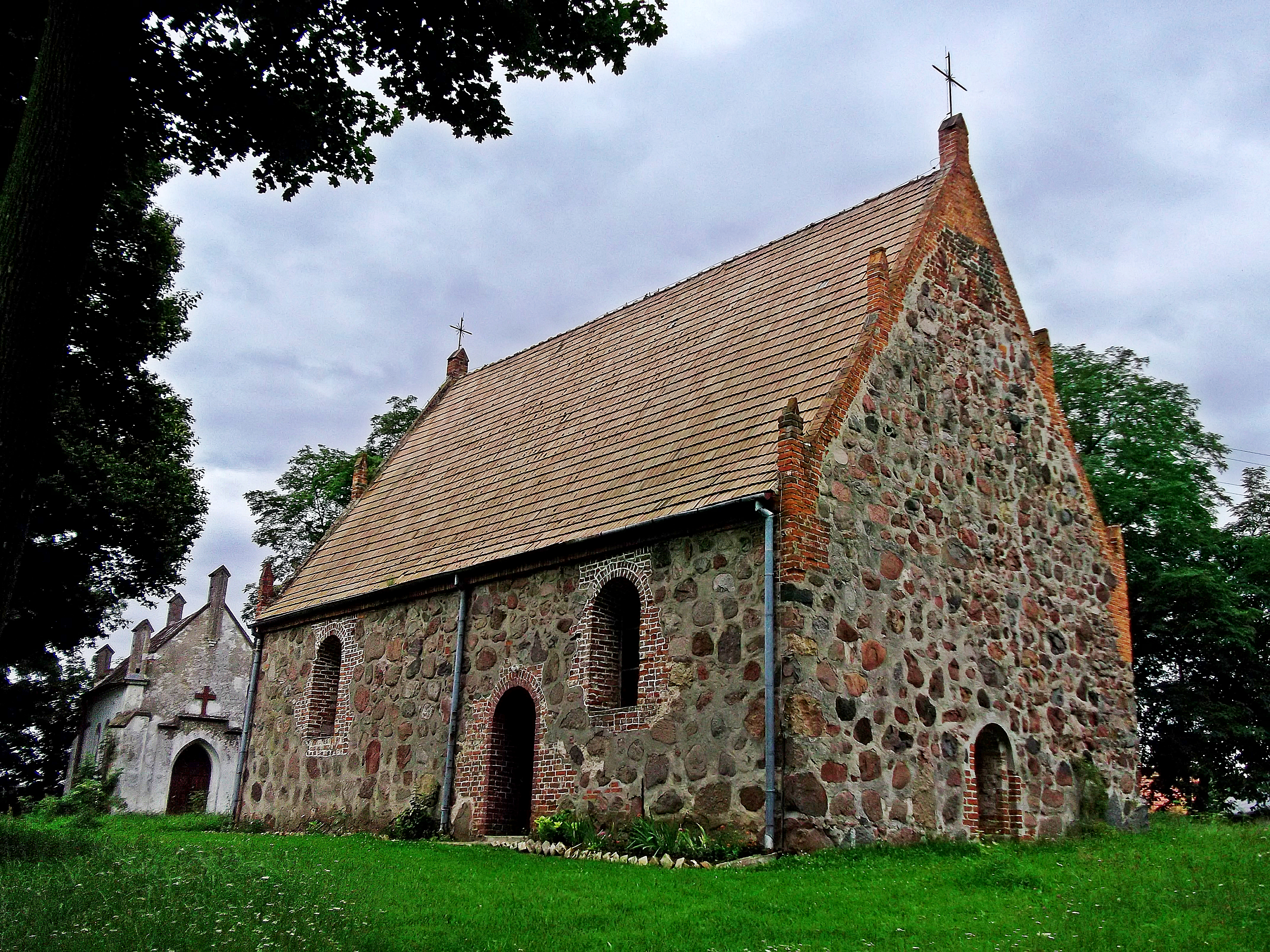 Rożnowo - kościół M.B. Częstochowskiej